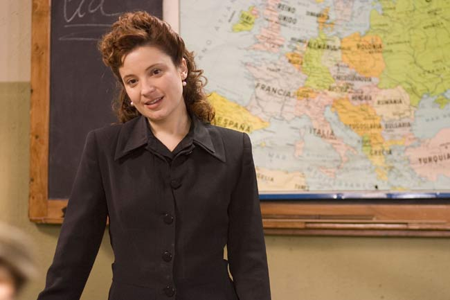 La actriz Ana Villa.